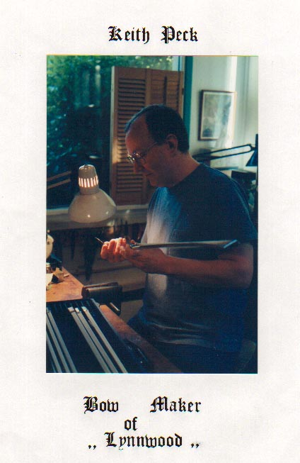 Keith Peck